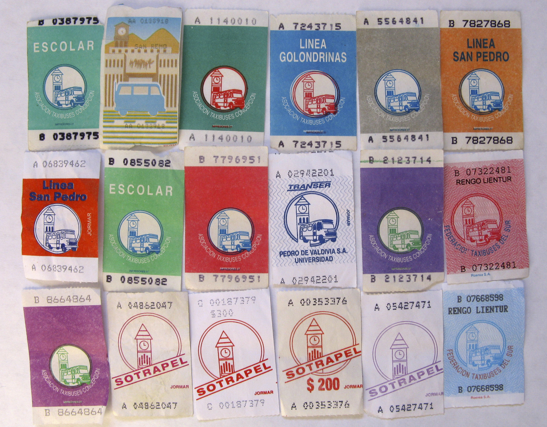 Algunos boletos de micros (buses) del Gran Concepción, Chile, donde figuran el Campanil de la Universidad de Concepción.